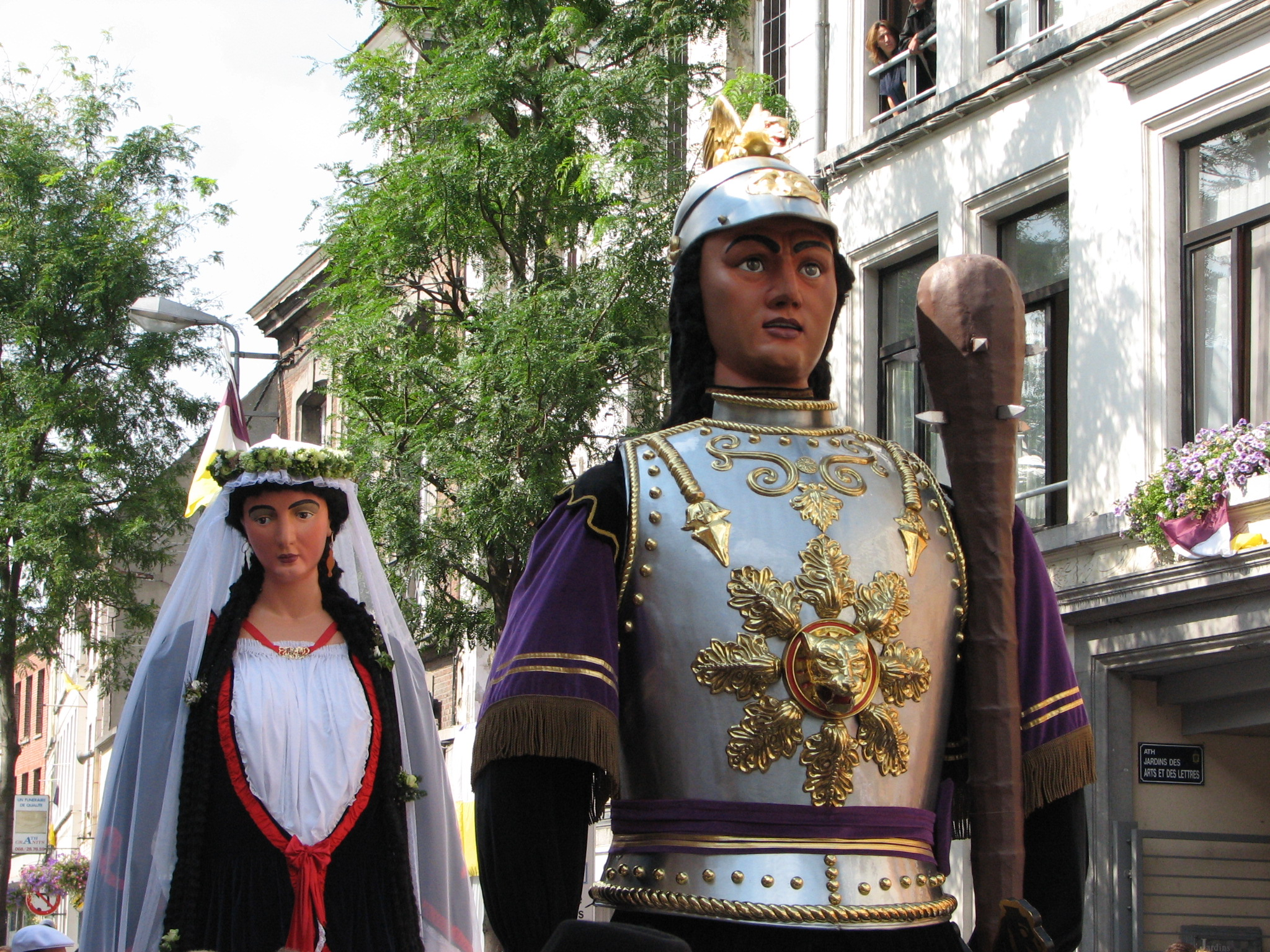 ¨M. et Mme Goliath, géants d'Ath, ducasse 2006